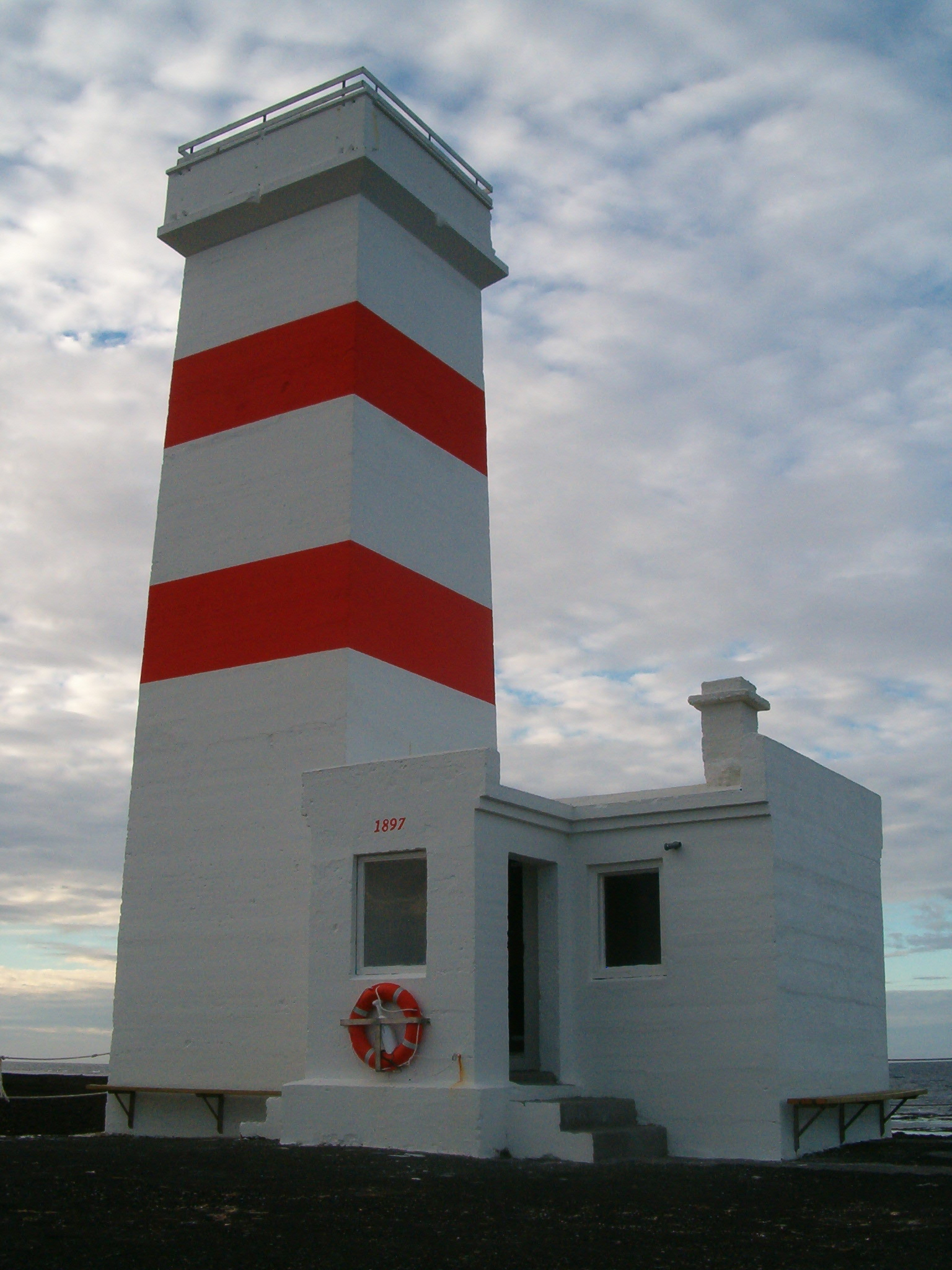 Leuchtturm.